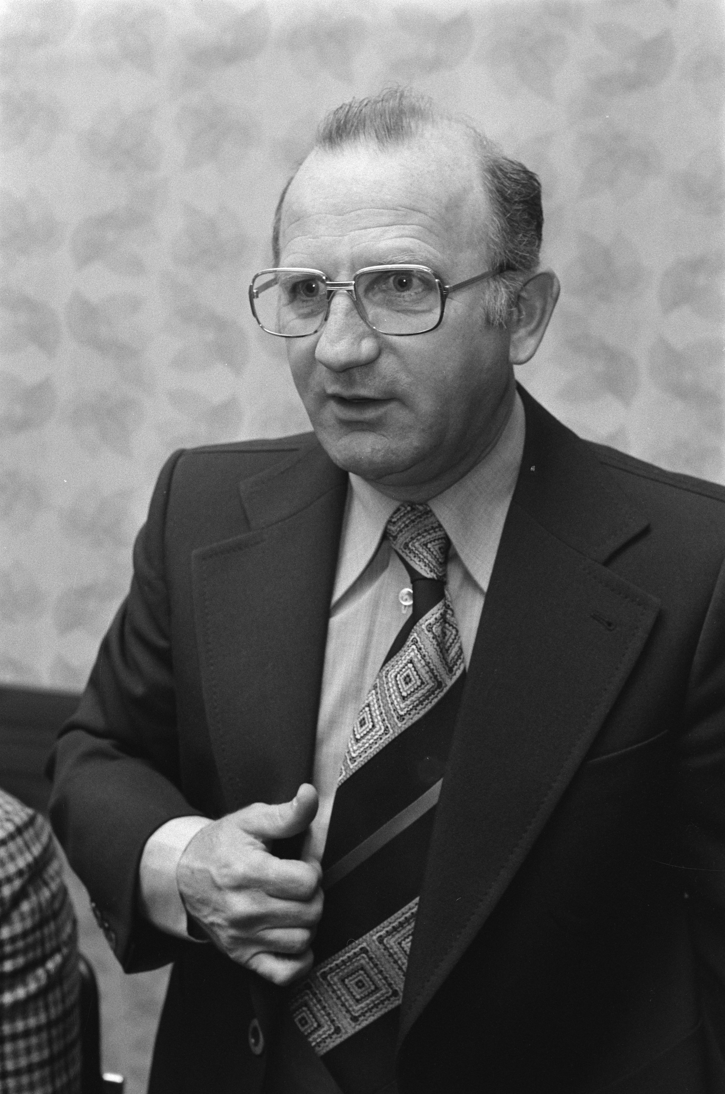 Collectie / Archief : Fotocollectie Anefo Reportage / Serie : [ onbekend ] Beschrijving : Training en persconferentie PSV en Benfica in Eindhoven; nr. 2, 3 Benficatrainer Pavic (kop), ner. 4 PSV-trainer Rijvers (kop) / Datum : 4 maart 1975 Locatie : Eindhoven Trefwoorden : persconferenties Persoonsnaam : Rijvers, Kees Instellingsnaam : Benfica Fotograaf : Verhoeff, Bert / Anefo Auteursrechthebbende : Nationaal Archief Materiaalsoort : Negatief (zwart/wit) Nummer archiefinventaris : bekijk toegang 2.24.01.05 Bestanddeelnummer : 927-7896